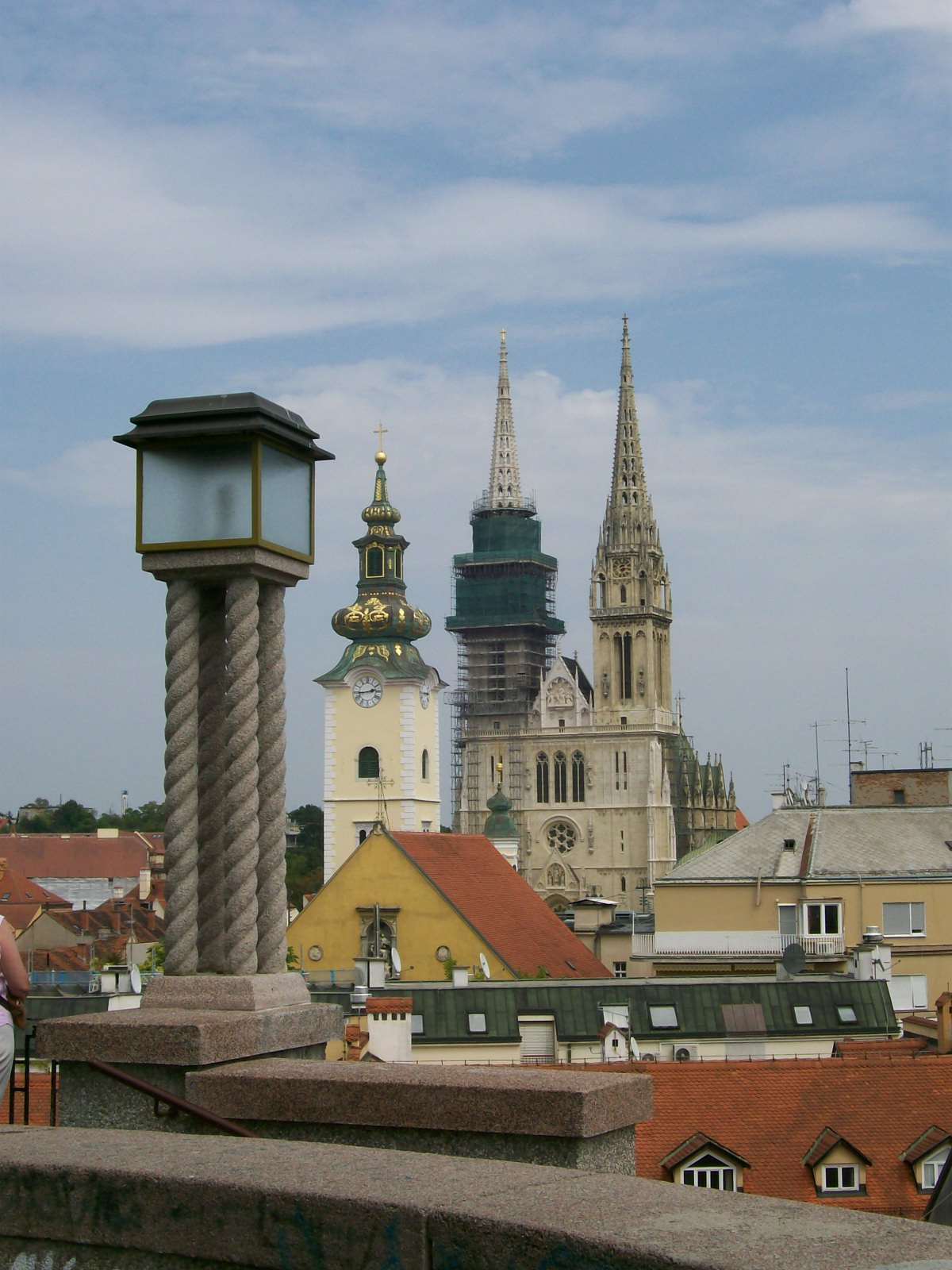 Pogled s Gornjeg grada (Strossmayerovog šetališta) na katedralu